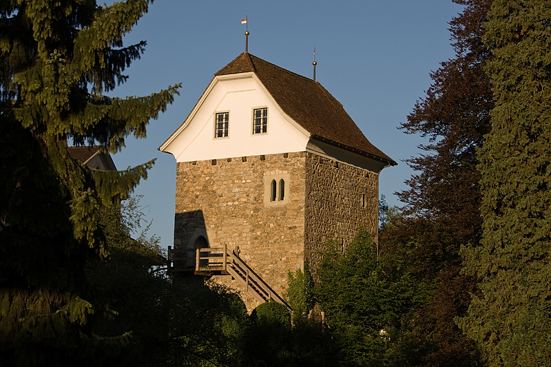 Hexenturm (Archivturm) in Sarnen